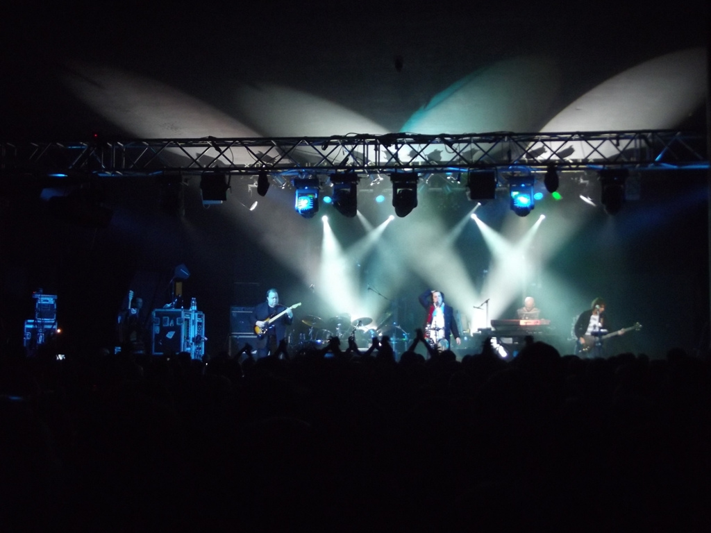 Zdjęcie zrobione podczas koncertu zespołu Marillion w krakowskim Klubie Studio.